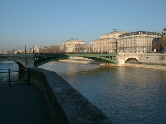 Parapet du quai de la Corse, Pont Notre-Dame (coté est) au-dessus de la Seine en direction du quai de Gesvres, IVe arrondissement, Paris, France.Taken by Robert Swinney